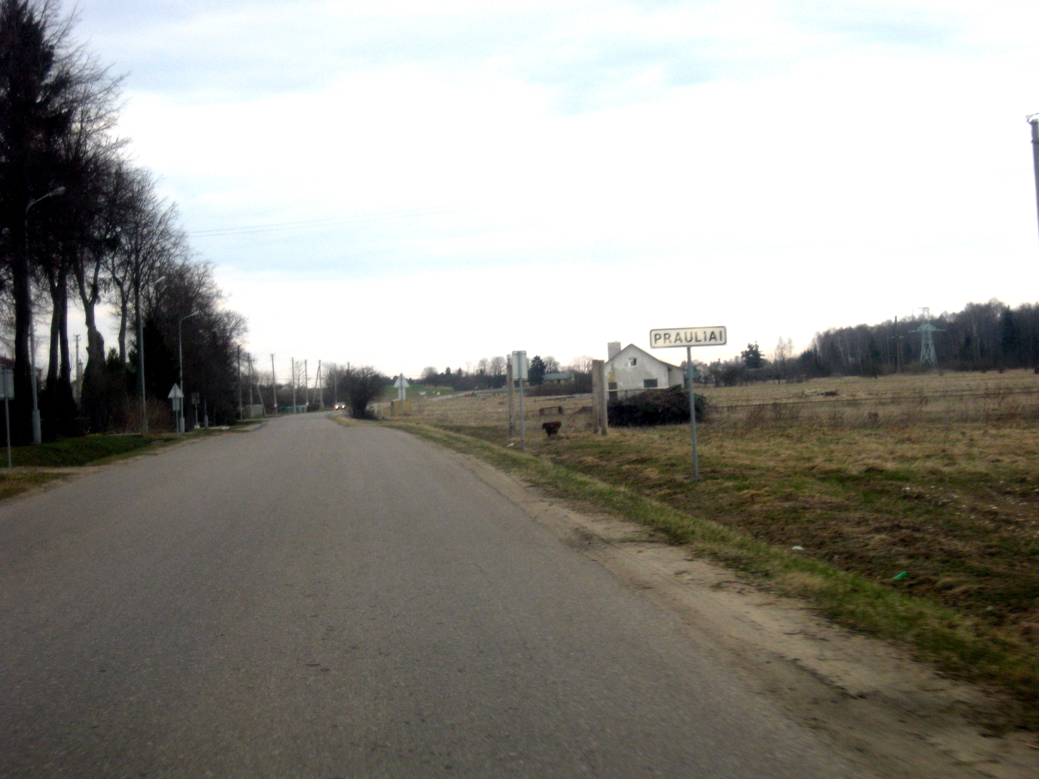 Prauliai